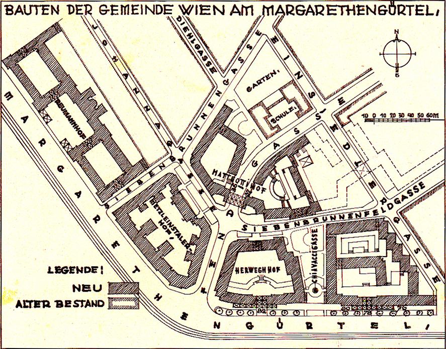 Gezeichneter Lageplan von vier benachbarten "Gemeindebauten" im 5. Wiener Gemeindebezirk, erschienen in einer Broschüre des Wiener Stadtbauamtes um 1927